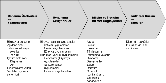 Bilişim değer zinciri, bilişim ve iletişim teknolojileri sektöründe katma değer oluşumunu betimleyen görsel bir modeldir. Bu model, bilişim ve iletişim değer sistemini meydana getiren öğeleri ve bu öğeler arasında ürün ve hizmet akışını göstermekte, sektörde katma değerin nasıl yaratıldığını ifade etmektedir.